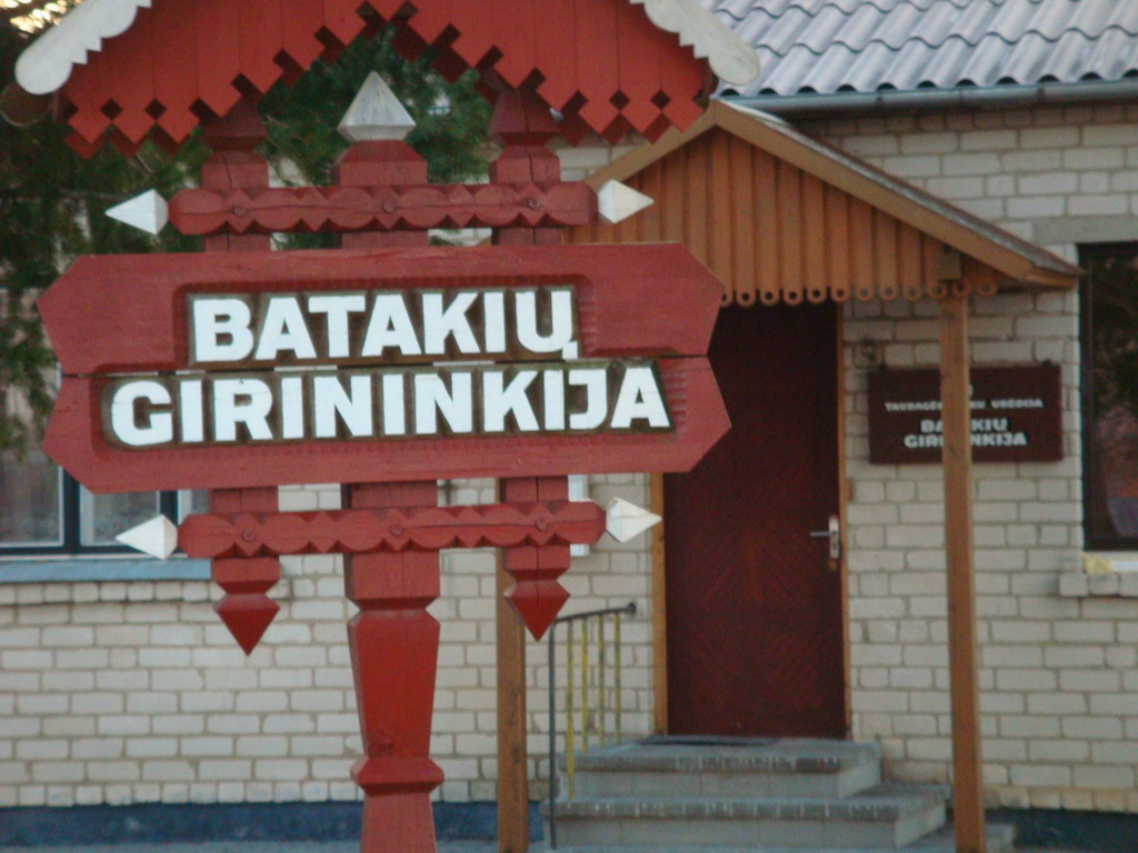 Batakių girininkija, Tauragės raj.